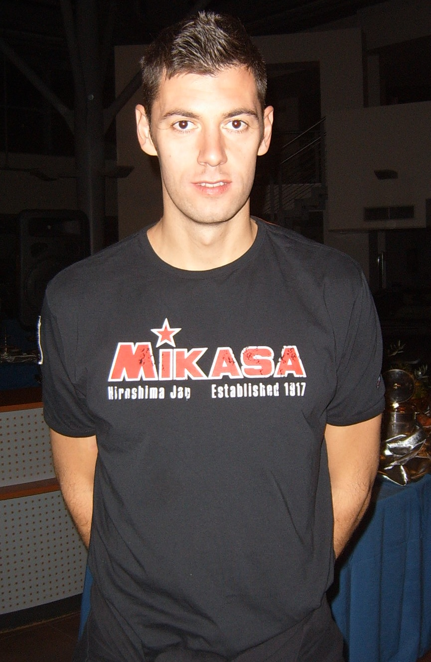 Presentazione Sir Safety Umbria Volley 2013-2014